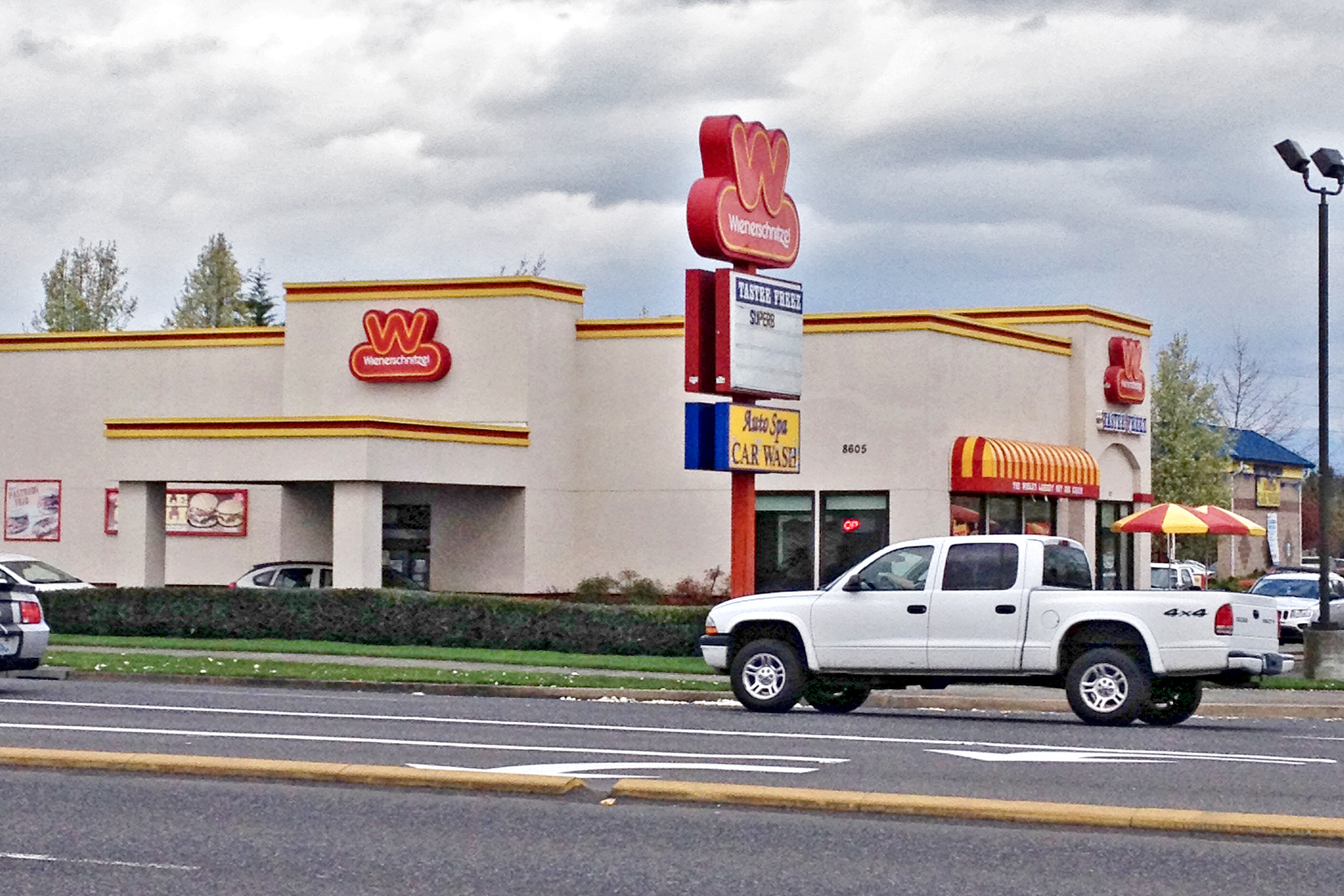 Wienerschnitzel in Vancouver, WA.